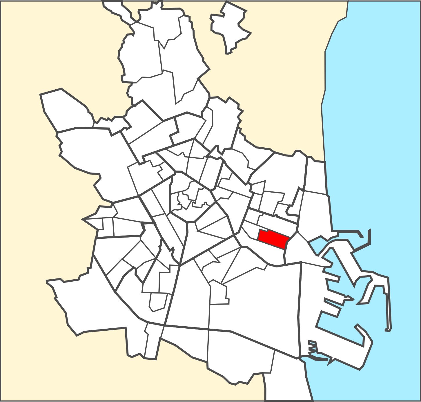 Localització del barri dins de la ciutat de València.